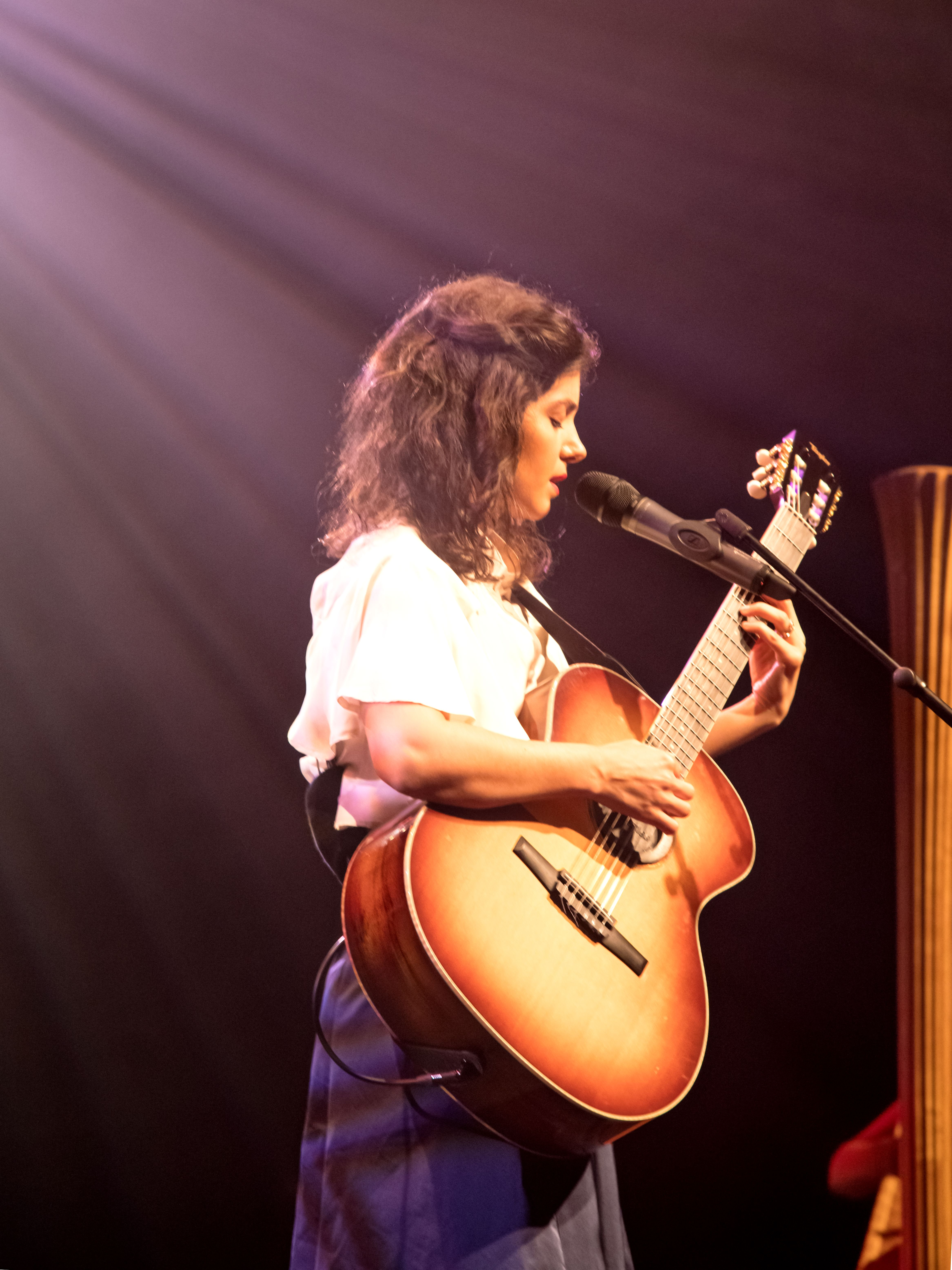 Bilder vom Zelt Musik Festival 2016 in Freiburg im Breisgau Katie Melua